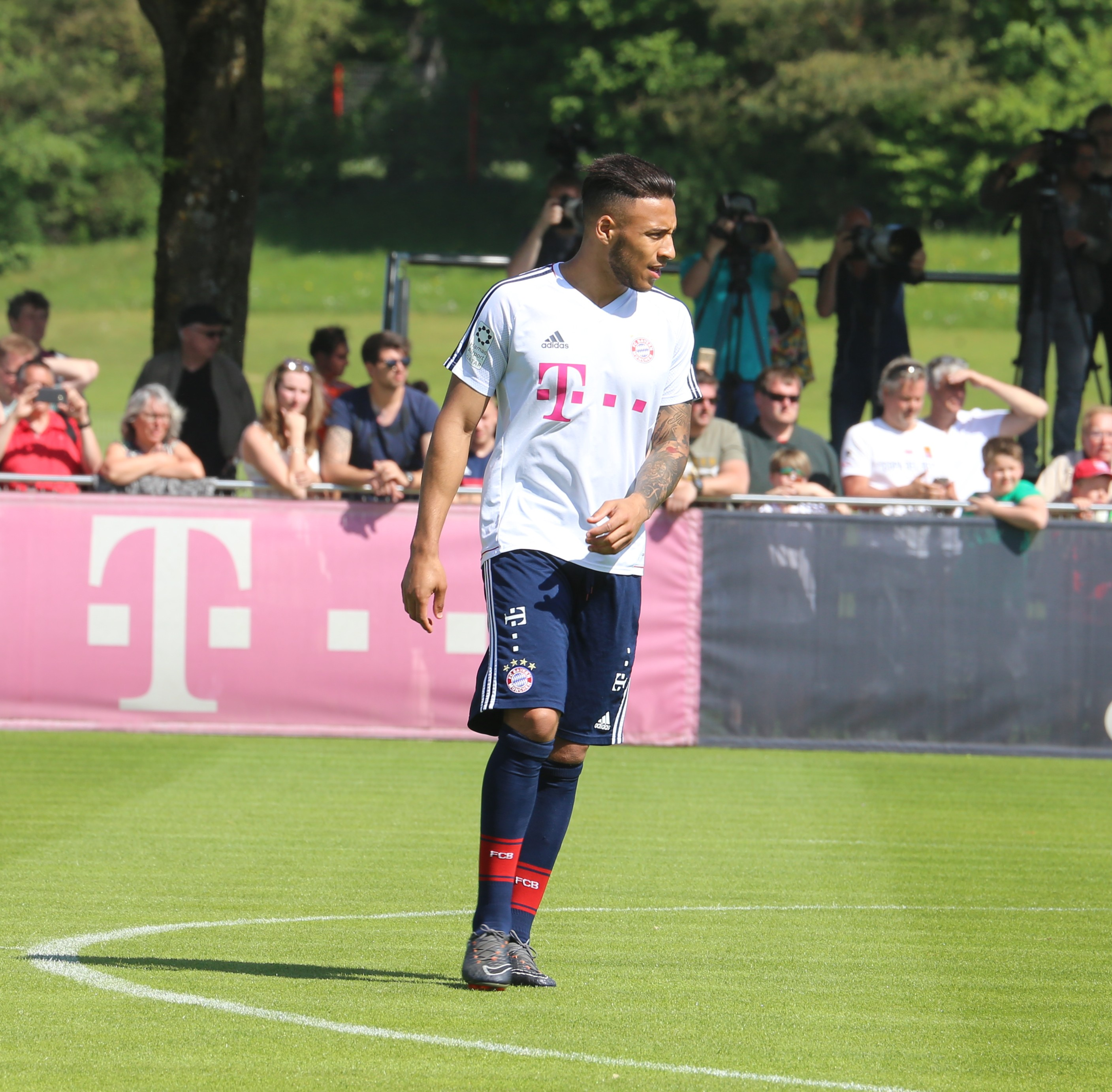 Corentin Tolisso, am 8. Mai 2018 beim Training auf dem Gelände des FC Bayern München